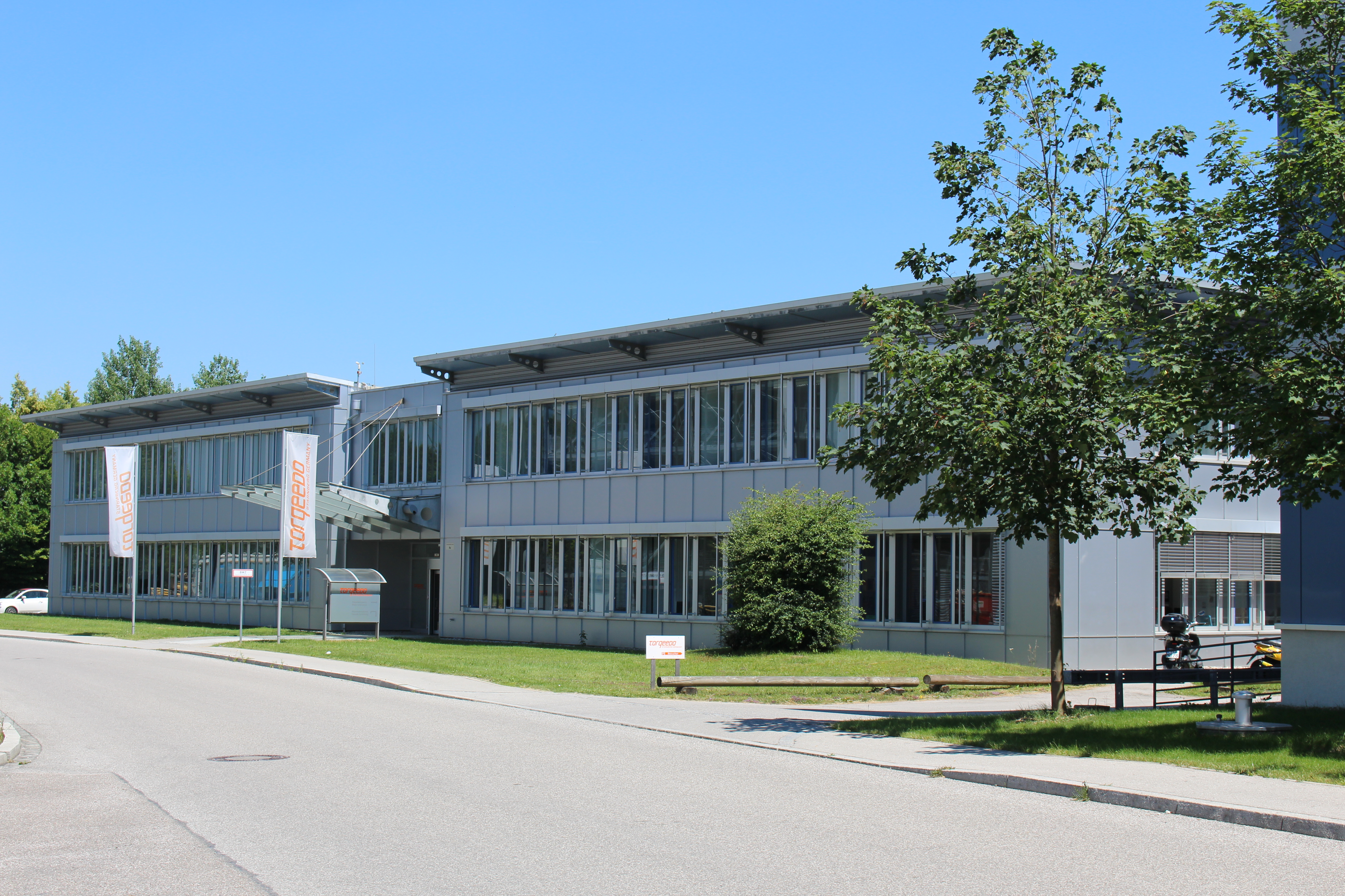 Torqeedo Unternehmenszentrale in Gilching, Landkreis Starnberg